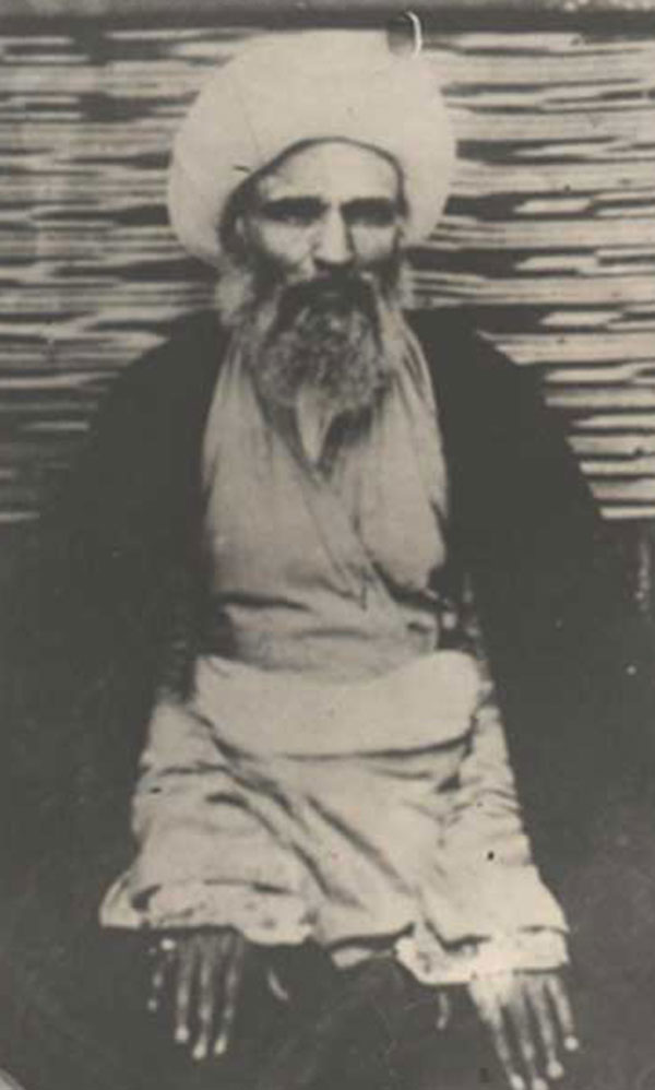 مرحوم آخوند ملا محمد کاظم خراسانی